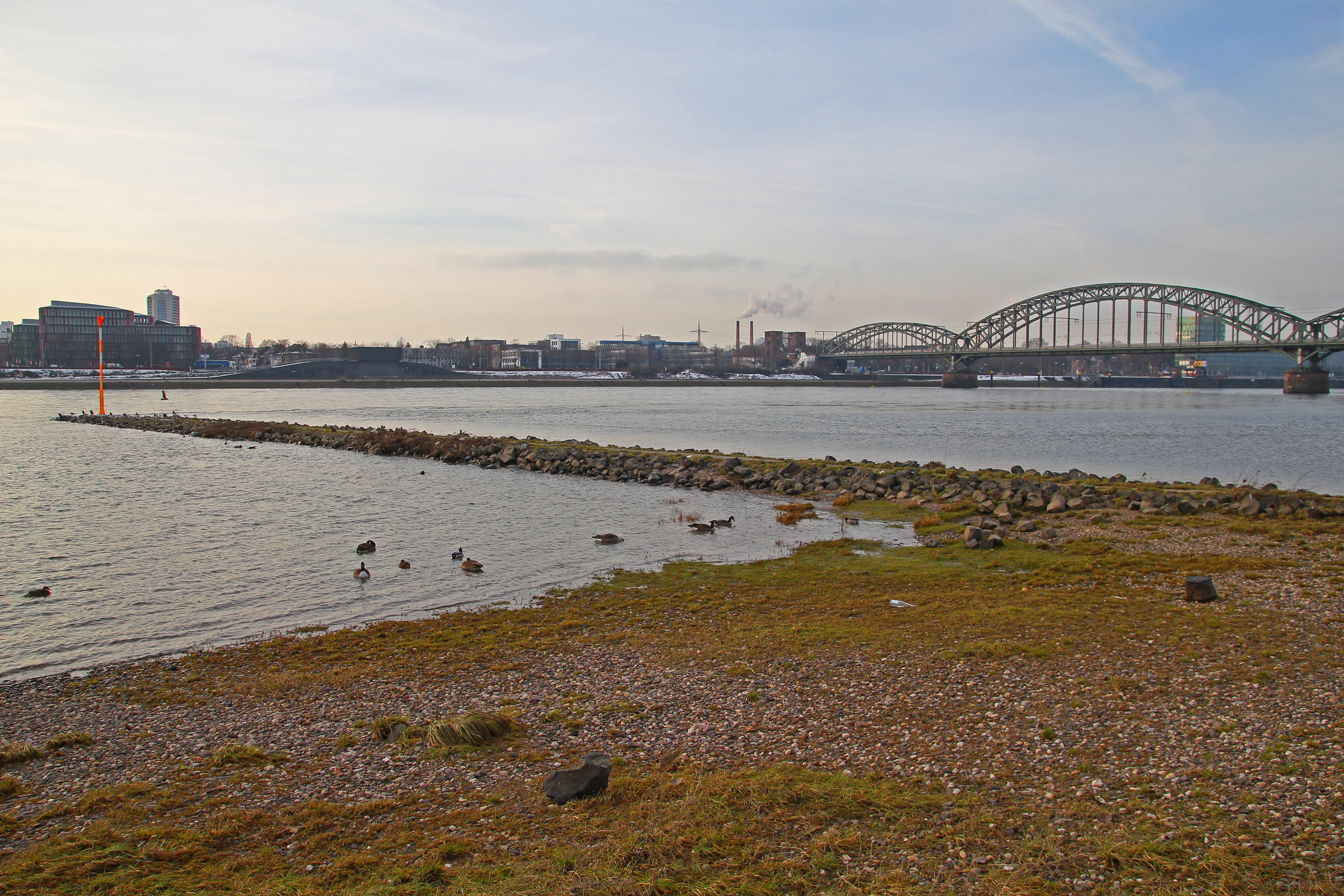 Blick auf den Rhein in Köln von den Poller Wiesen. Eine Landzunge von den ehemaligen Poller Köpfen.